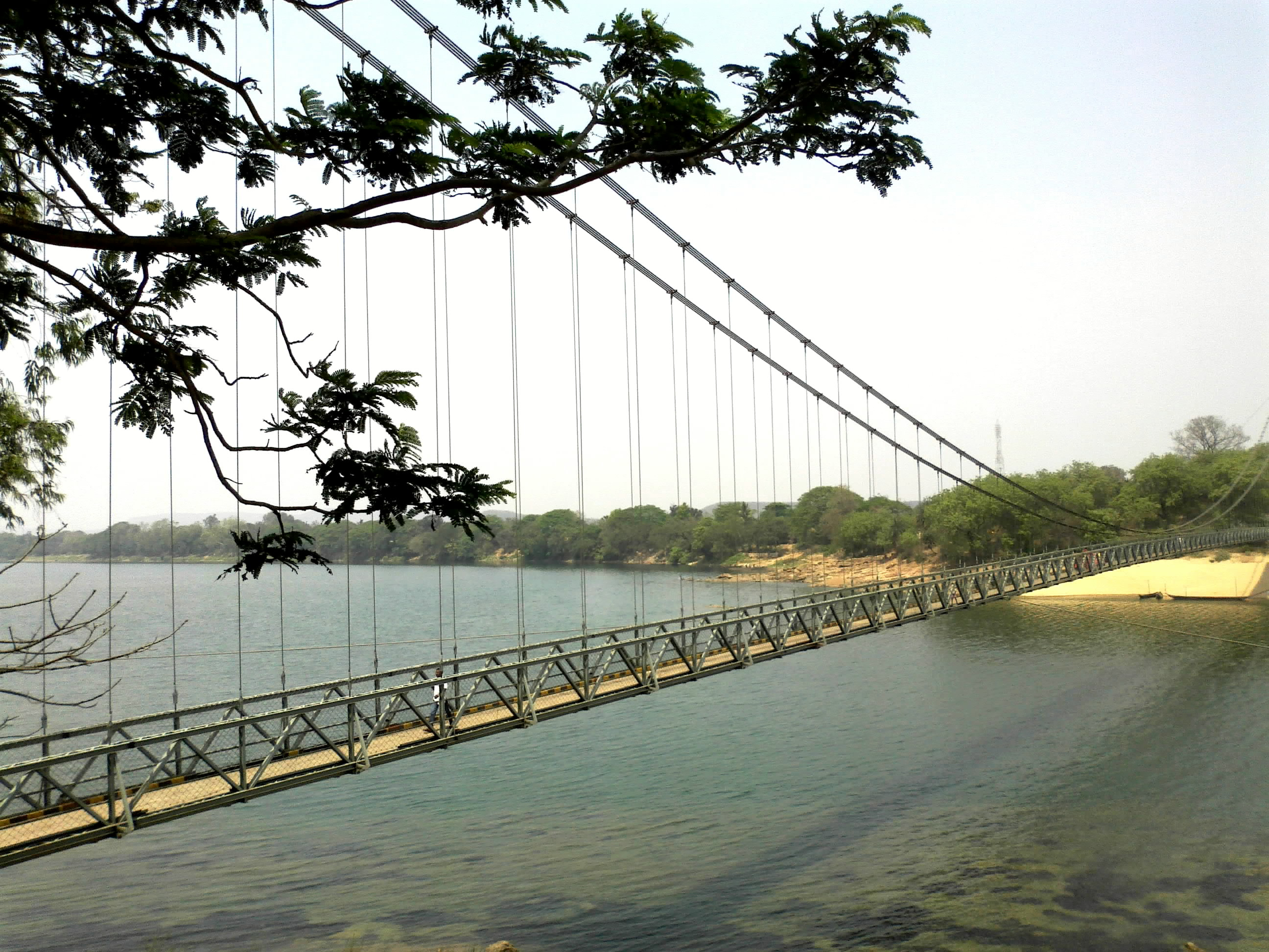 ଓଡ଼ିଆ: ଧବଳେଶ୍ବର